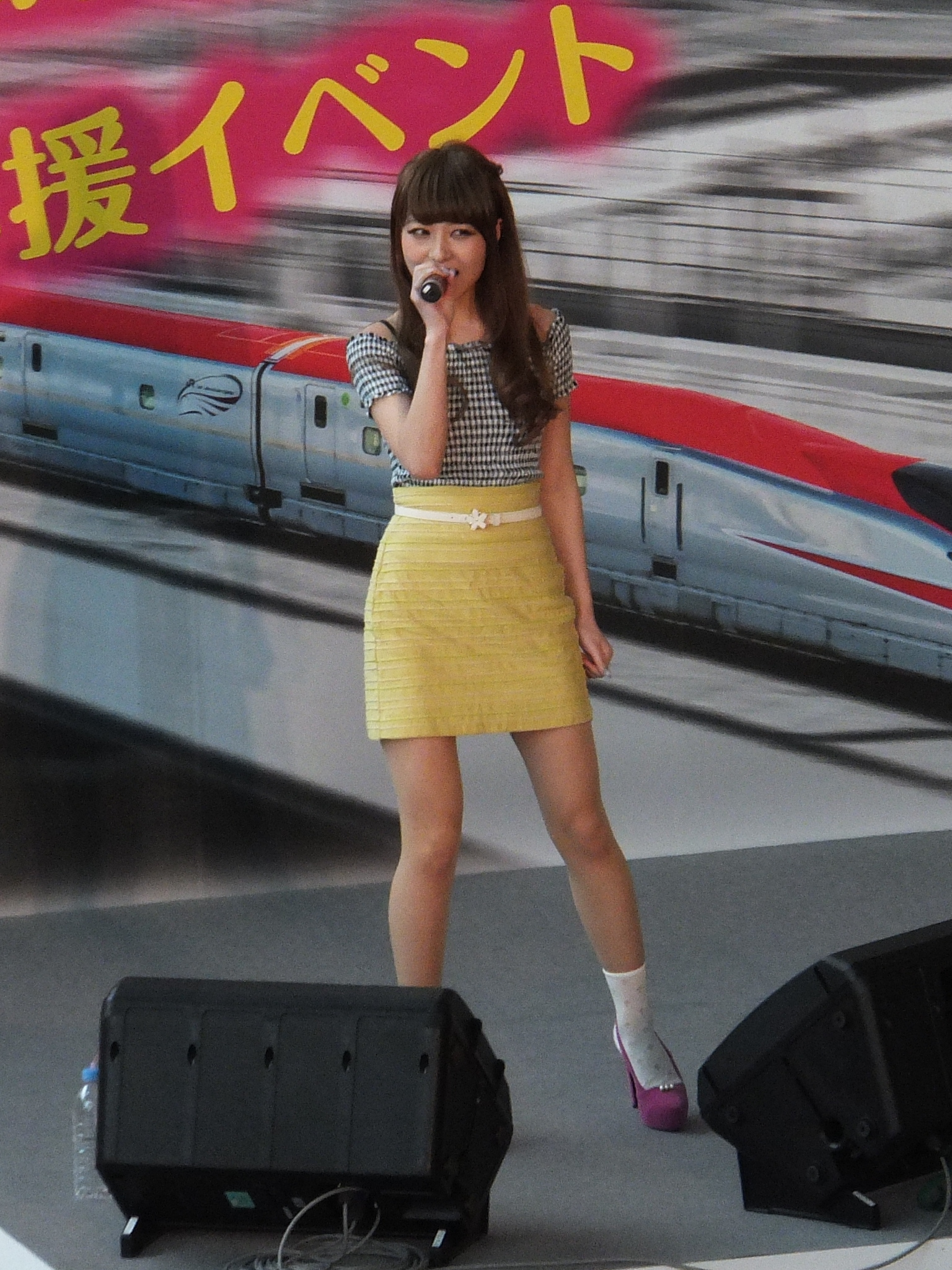 秋田県にかほ市出身の歌手、三浦サリー。秋田拠点センター・アルヴェにて2014年3月21日に開催されたミニコンサート（秋田新幹線320km/h運転開始記念、国民文化祭応援イベント）にて。